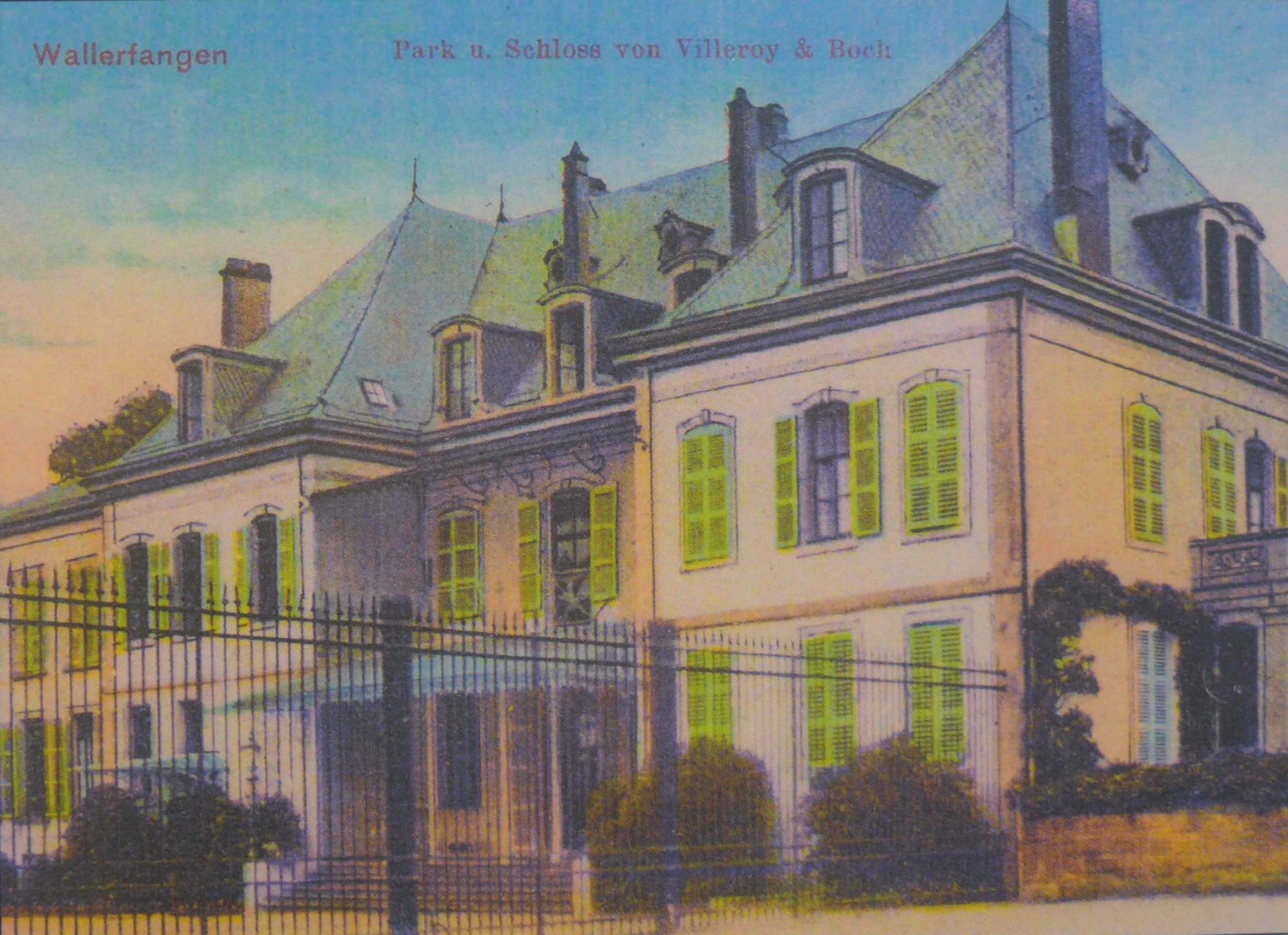 Wallerfangen, Schloss de Galhau/Papen, Postkarte um 1900 (Heimatmuseum Wallerfangen)